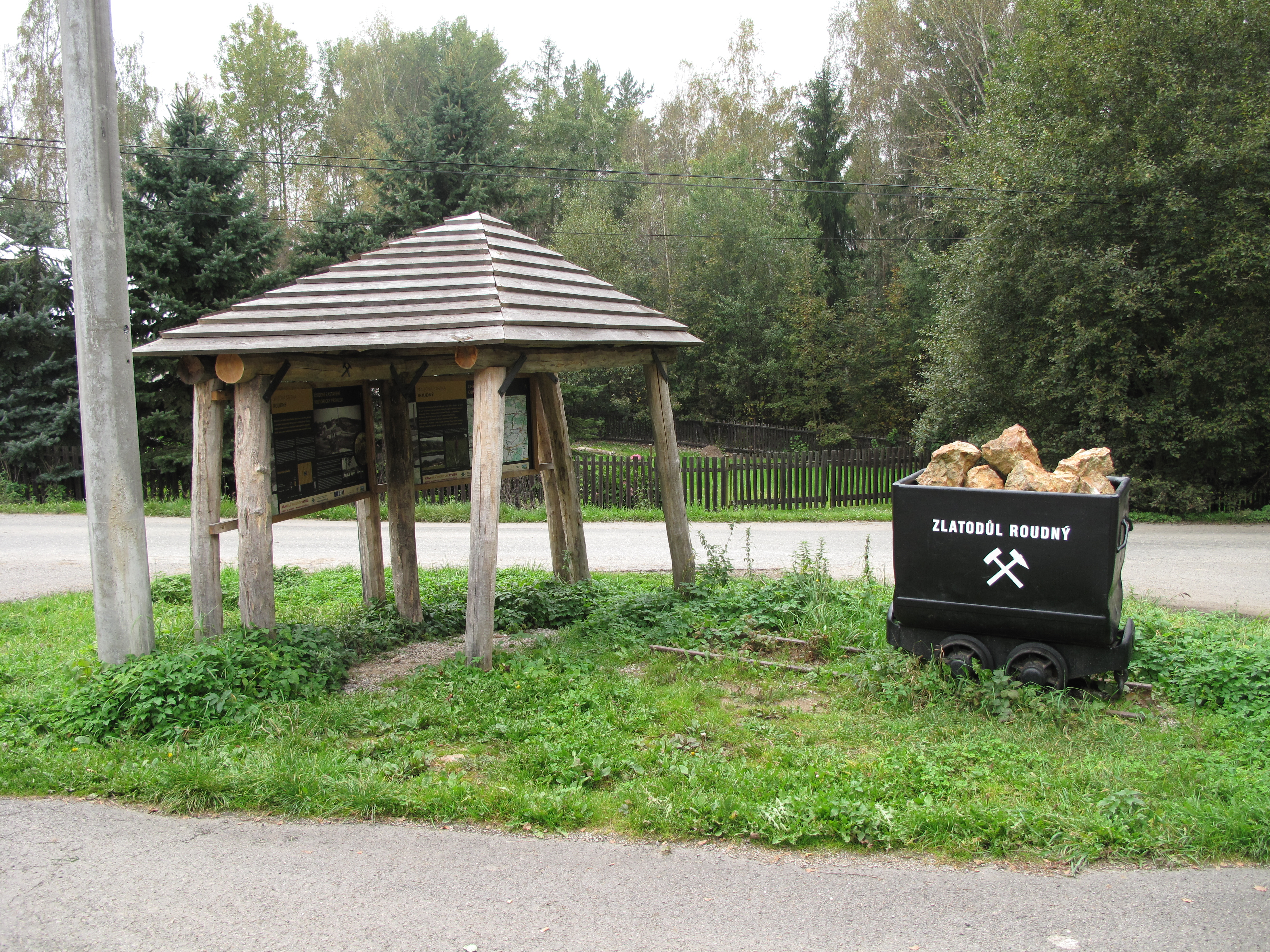 Vozejk v Roudném. Okres Benešov, Česká republika.